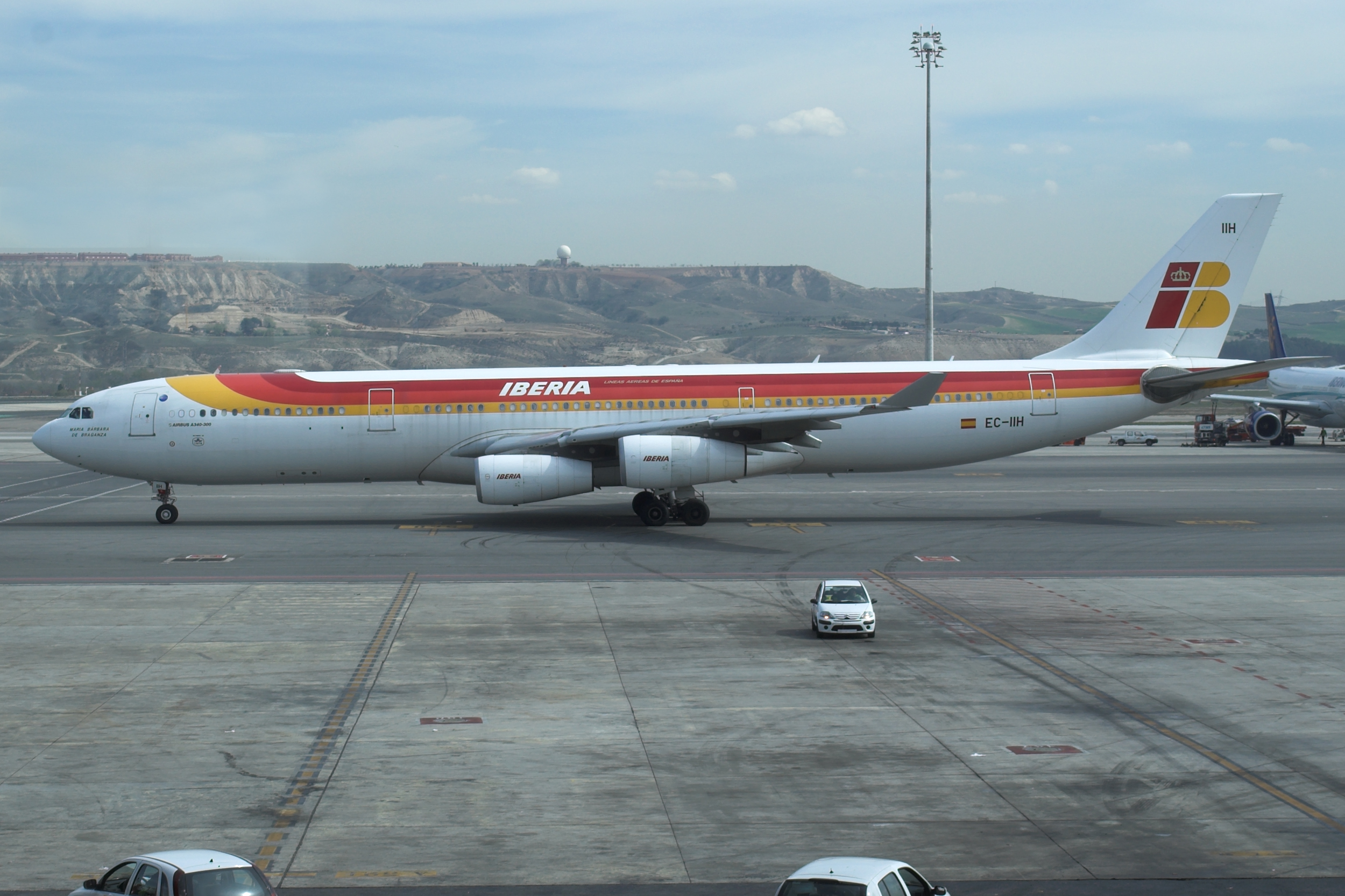 Iberia Airbus A340-300 EC-IIH "Maria Barbara de Braganza"